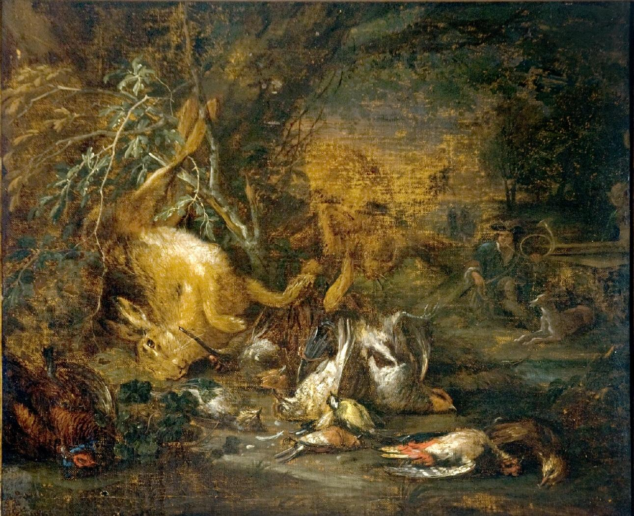 Bodegón